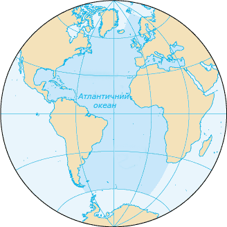 Карта Атлантичного океану